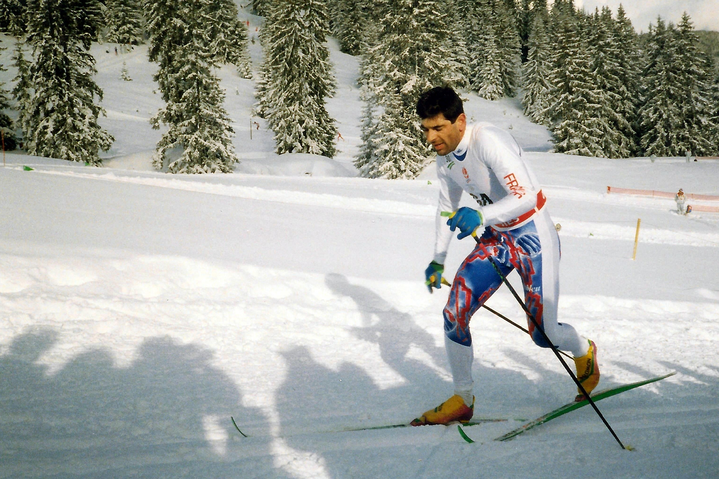 Patrick Rémy lors du 30 km hommes des J.O. d'Alberville, le 10 février 1992.